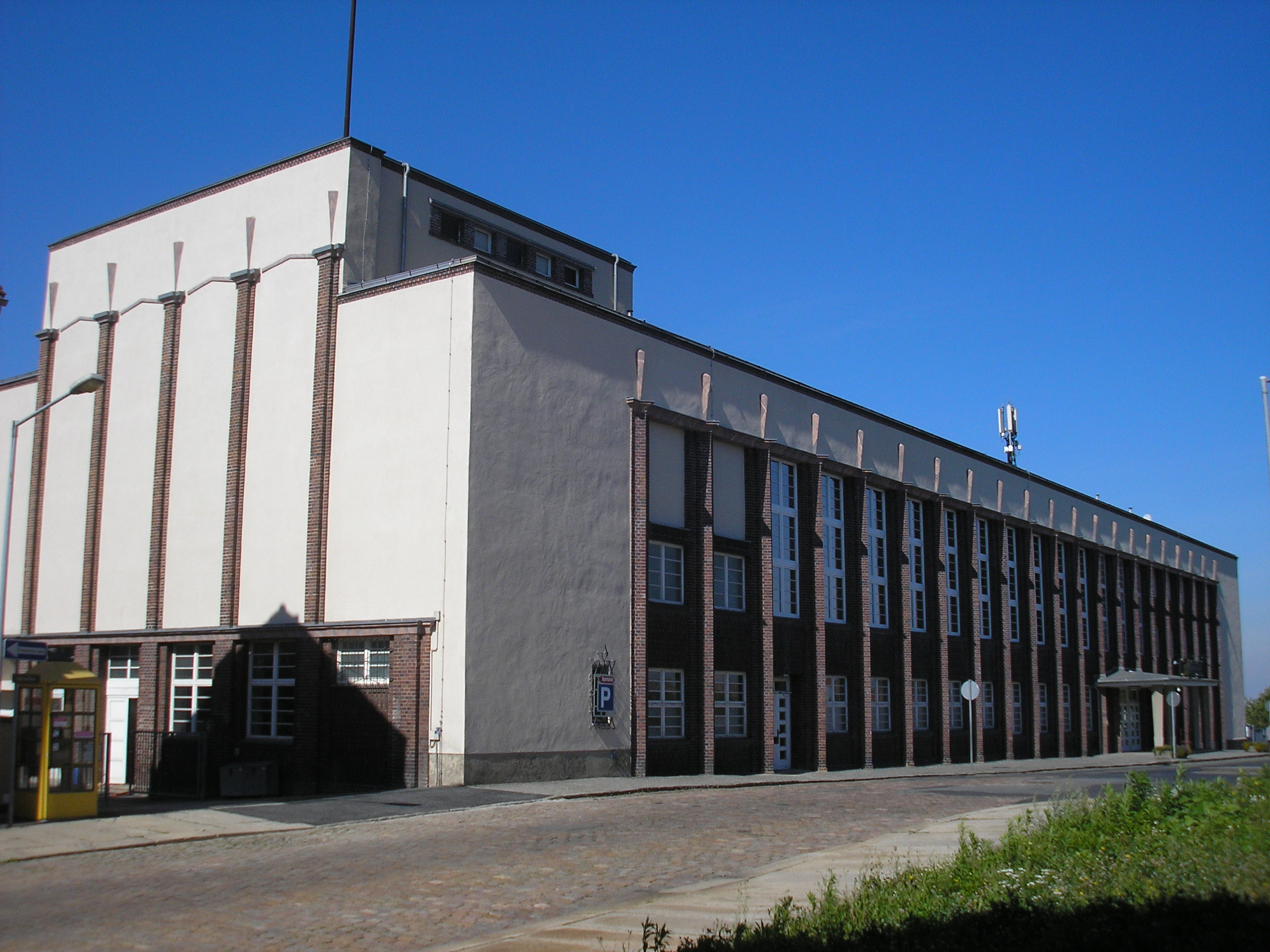 Die Stadthalle in Meerane (Sachsen).